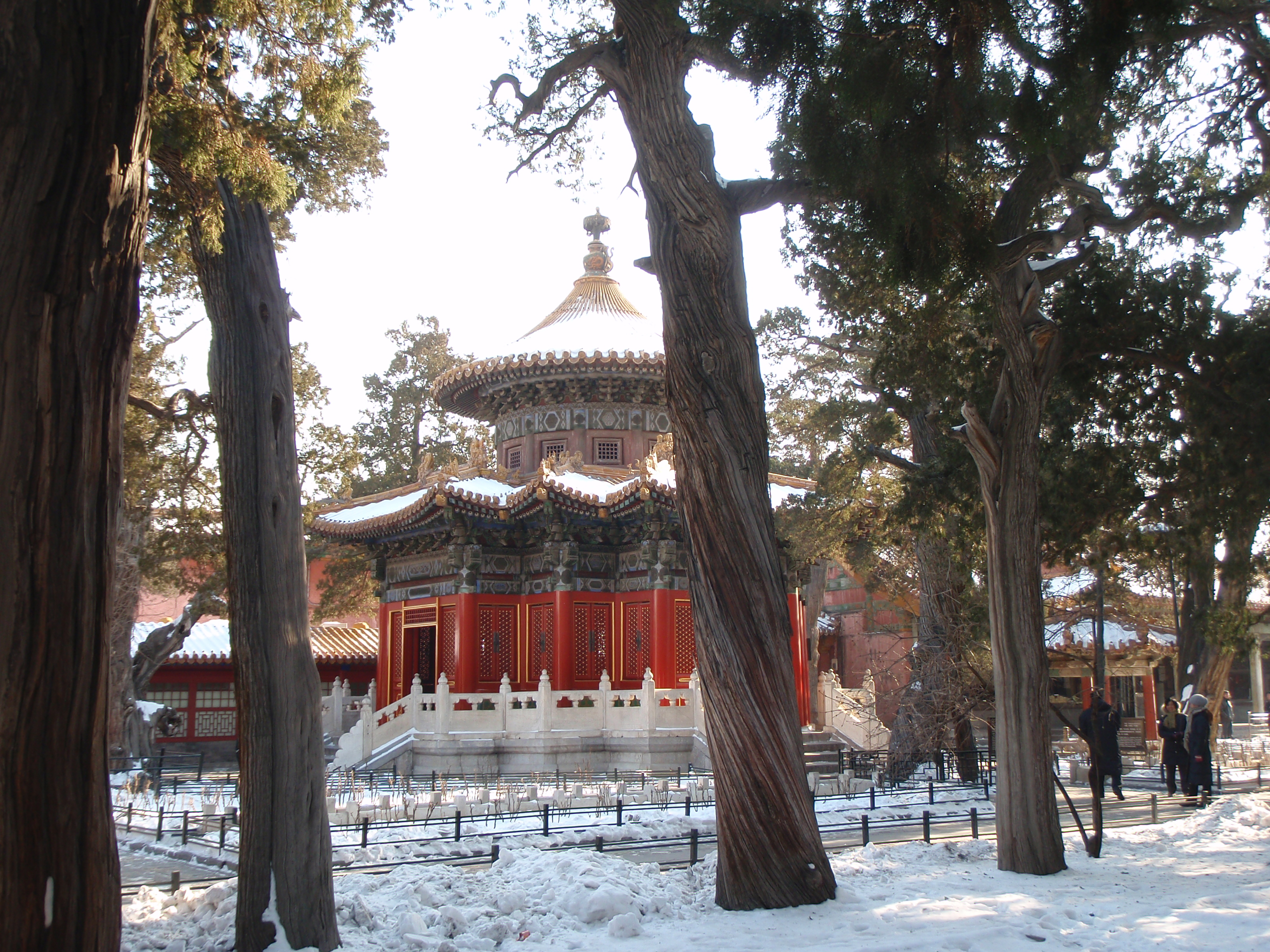 故宫御花园